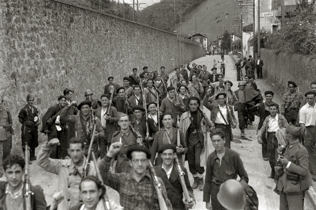 Título original: Grupos de milicianos con sus armas en la localidad de Alegia (6/10) Localización: Alegría de Oria (Guipúzcoa)